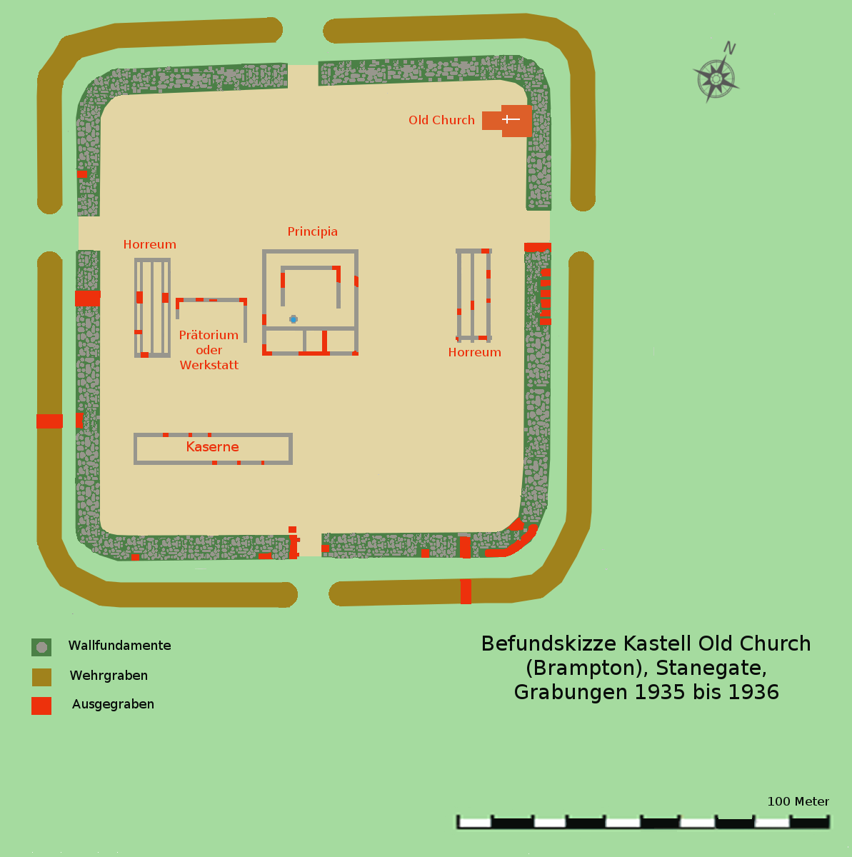 Befundskizze Kastell Old Church (Brampton), England, Stanegate, Grabungen 1935 und 1962.